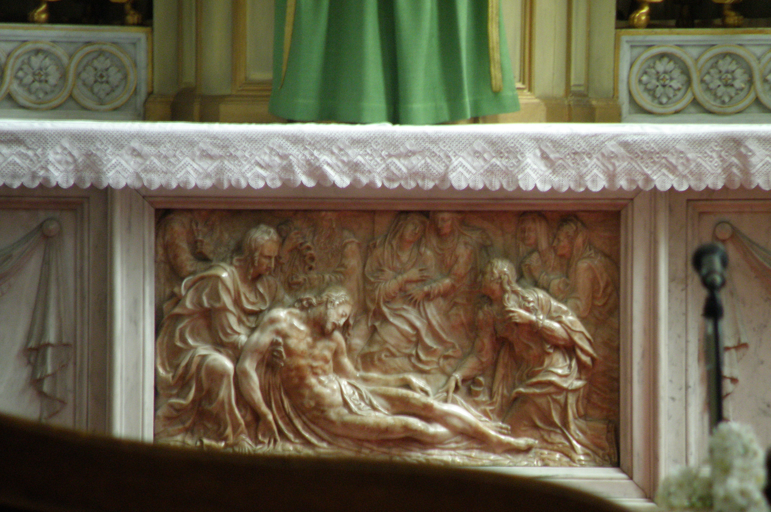 Brugge, Begijnhofkerk Sint Elisabeth. Antependium van hoofdaltaar.